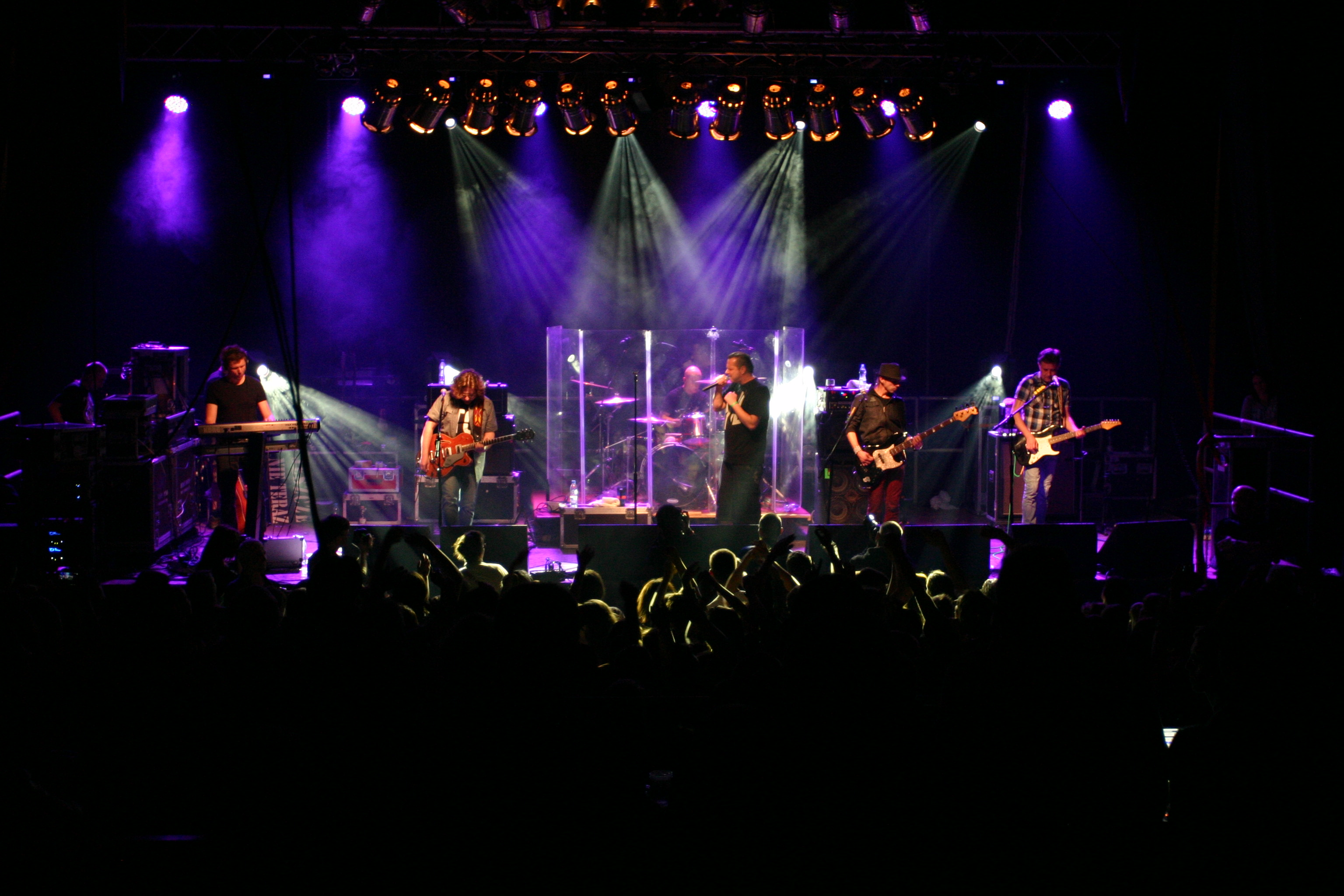 Strachy Na Lachy - Łódź, marzec 2014